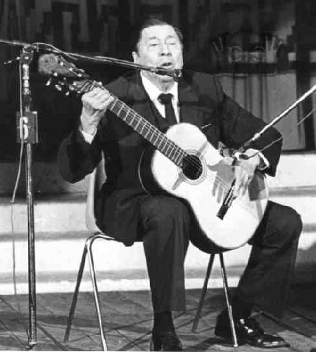 Atahualpa Yupanqui en el Festival de Cosquín 1979.